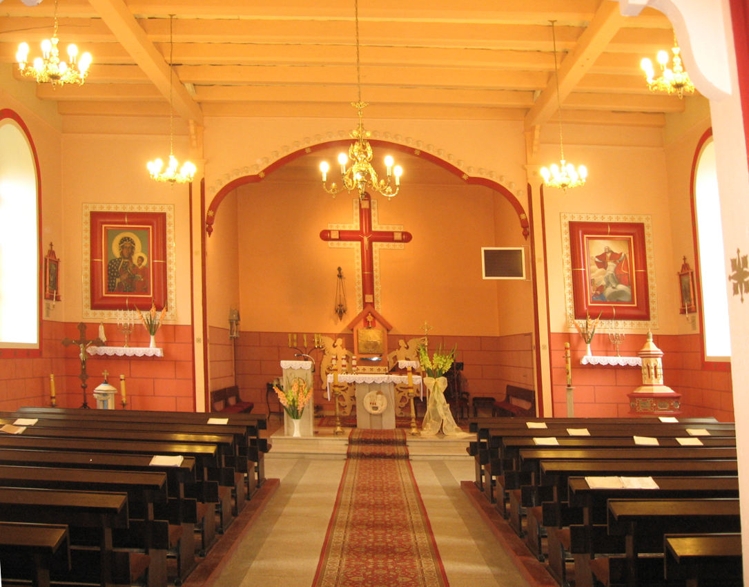 Obecny wygląd wnętrza kościoła w Dzięcielcu.